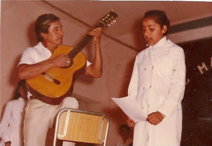 La Bruja Salguero y su papá "Tino" Salguero.